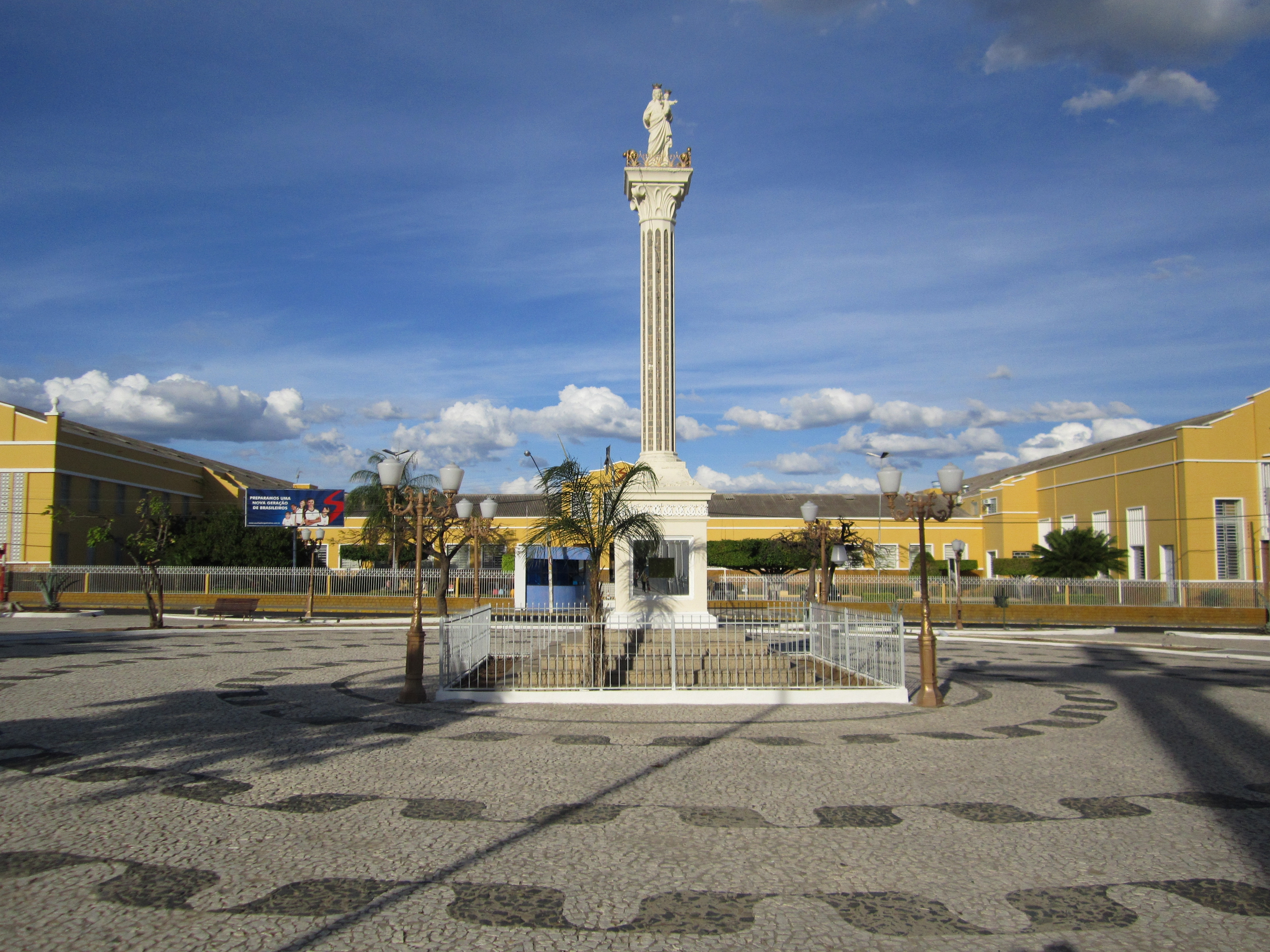 Praça Maria Auxiliadora e Colégio Nossa Senhora Auxiliadora - Petrolina, Pernambuco, Brasil